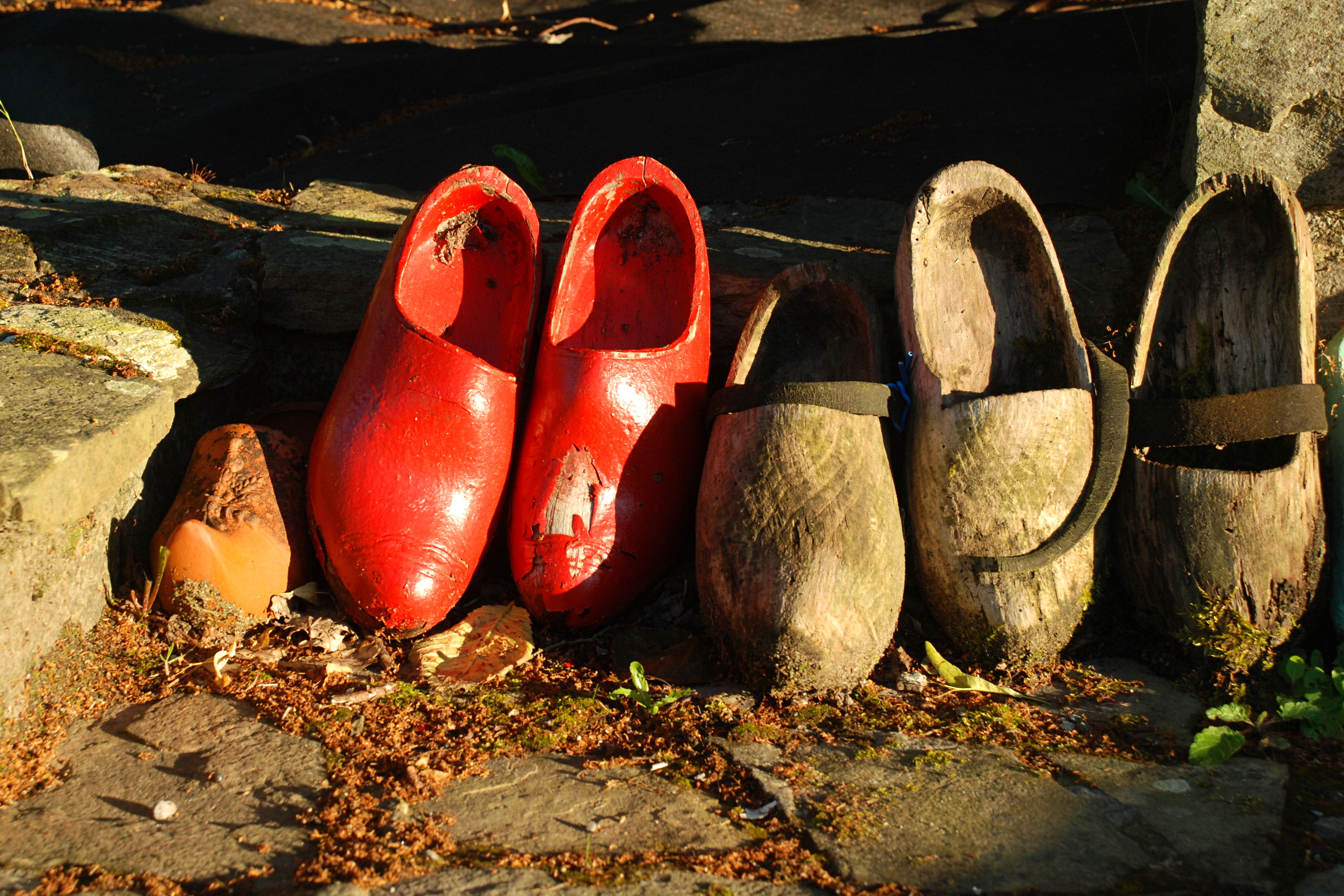 Belgique - Brabant wallon - Court-Saint-Étienne - Chapelle aux Sabots